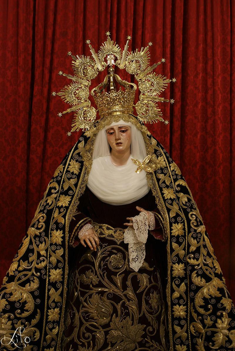 Fotografia realizada por Manuel Francisco Álvarez Ruiz.